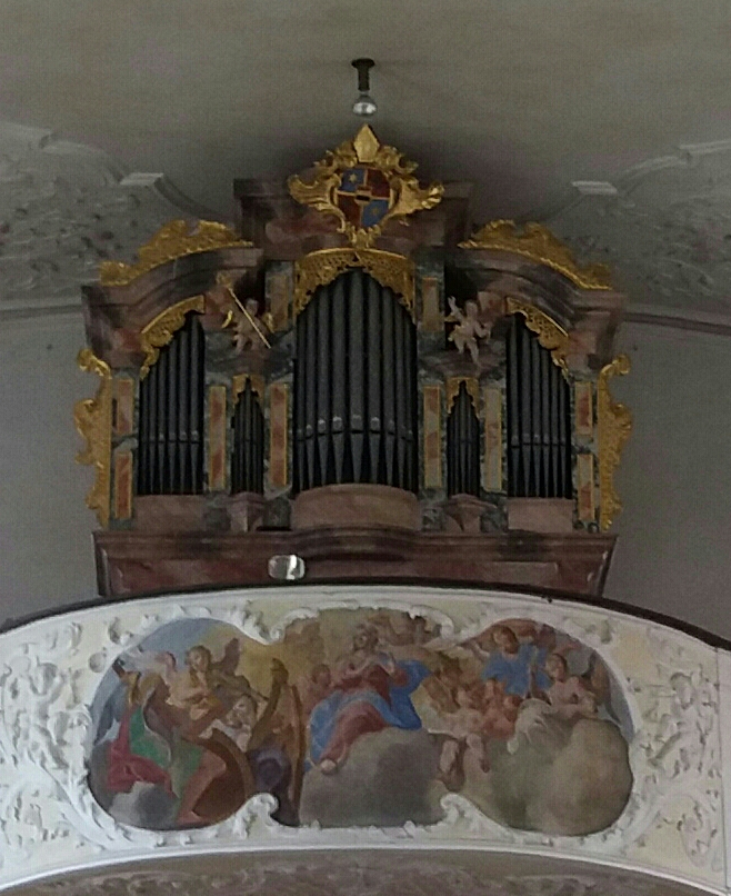 Orgel in der katholischen Pfarrkirche St. Martin in Deubach, einem Stadtteil der Stadt Ichenhausen im Landkreis Günzburg.